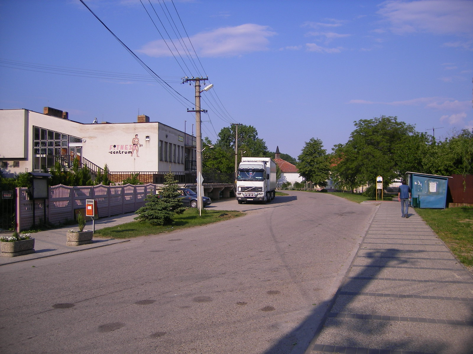 Szímő - utcakép